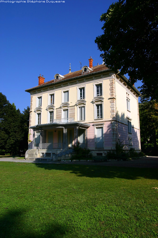 La maison de la Vallée et la parc de la Sapinière à Barcelonnette - Vallée de l'Ubaye - Alpes de Haute Provence - France